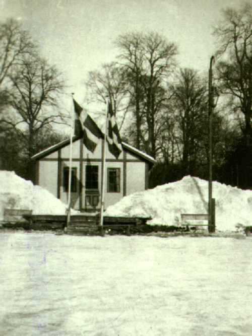 Frederiksberg Skøjteløber Forenings klubhus ud til søen ved Andebakkeøen i Frederiksberg Have, ca. 1924.